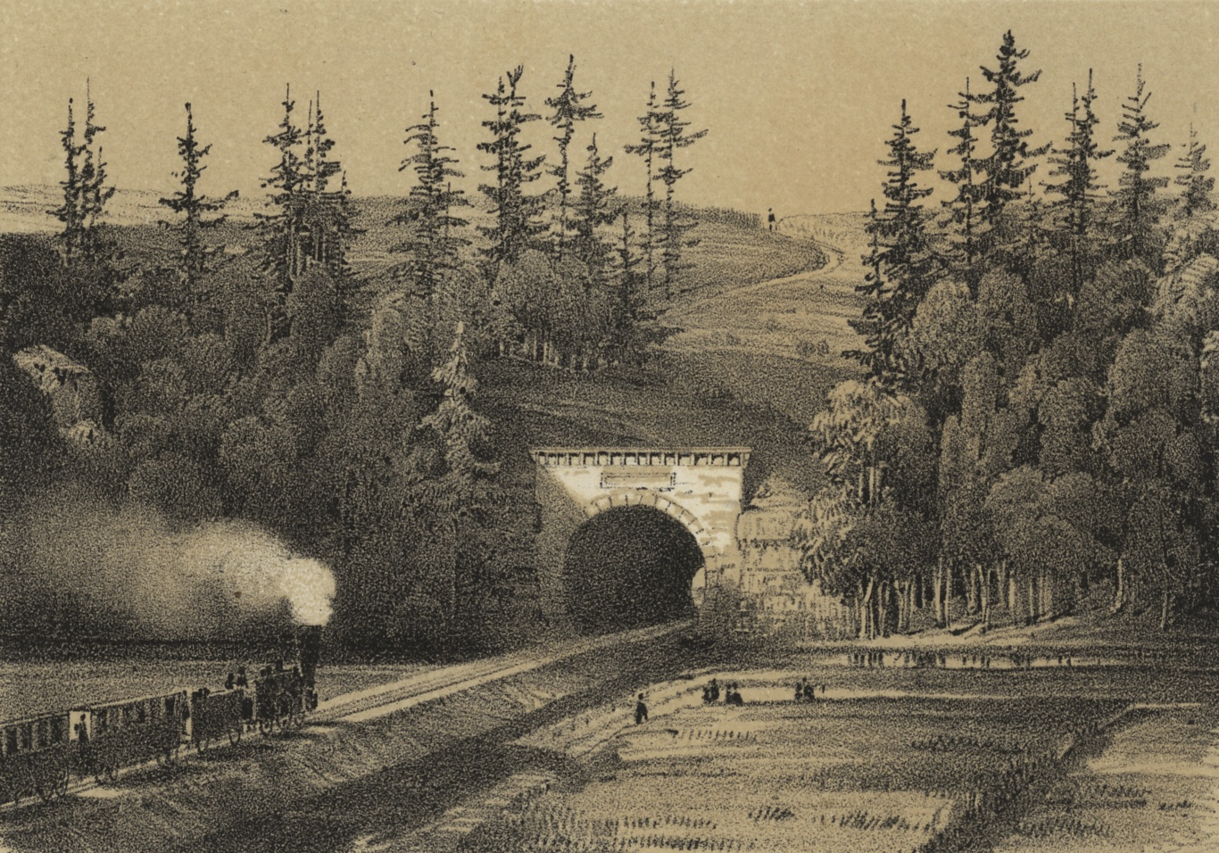 Tunel u Chocně, portál směrem k Olomouci.